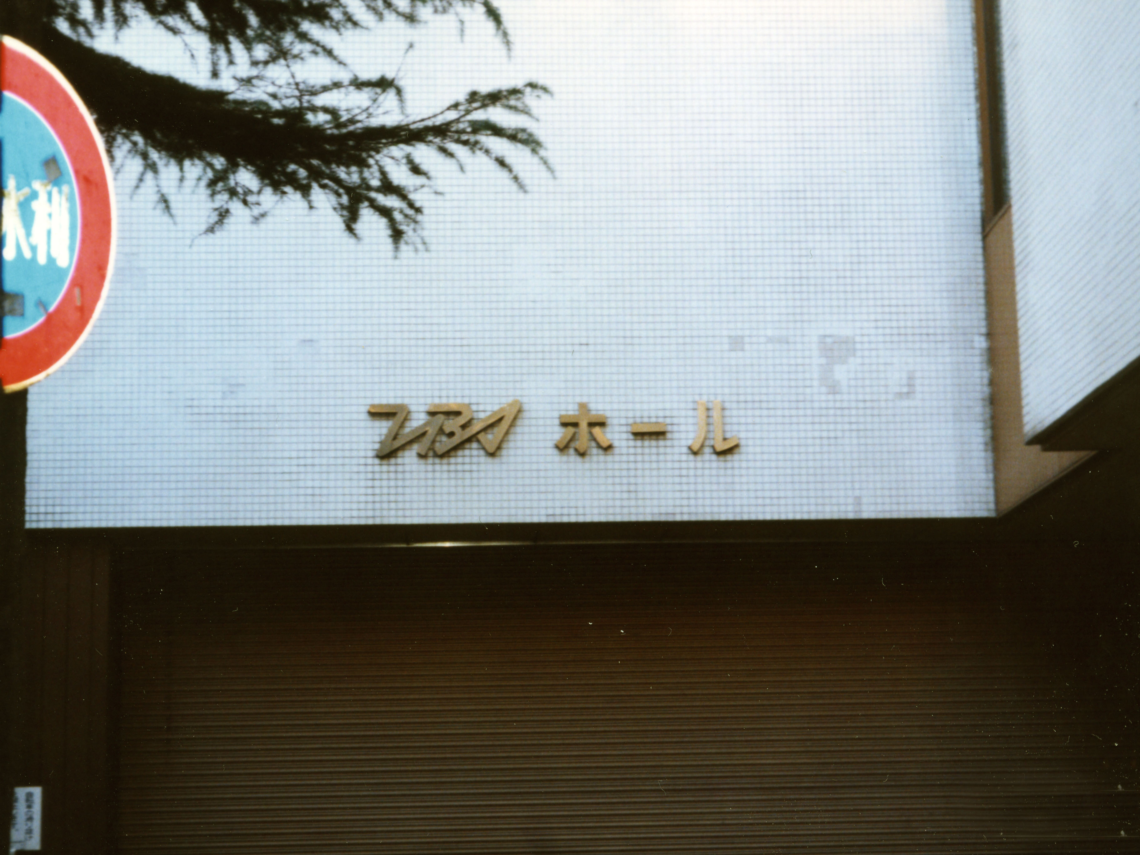 TBS Hall, Akasaka, Minato-ku, Tokyo, Japan.